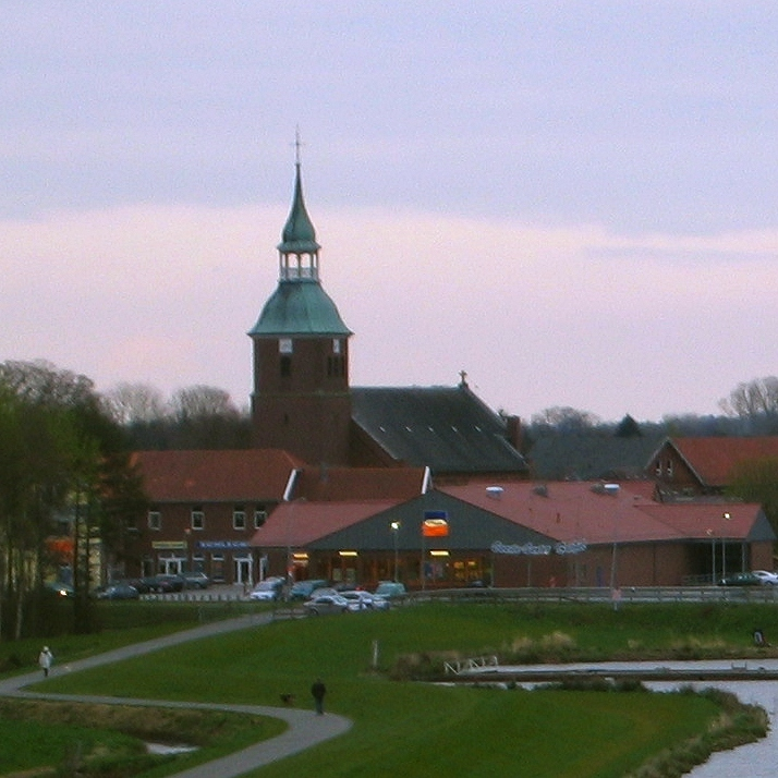 Barßel: Blick vom Bootshafen-Aussichtsturm auf die katholische Kirche „St. Cosmas und Damian“